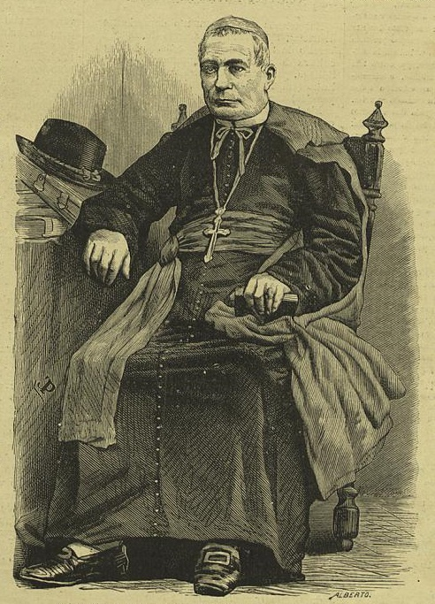 D. Joaquim Gonçalves D' Azevedo, Arcebispo da Bahia. Falecido em 6 de novembro de 1879 (Segundo uma fotografia).